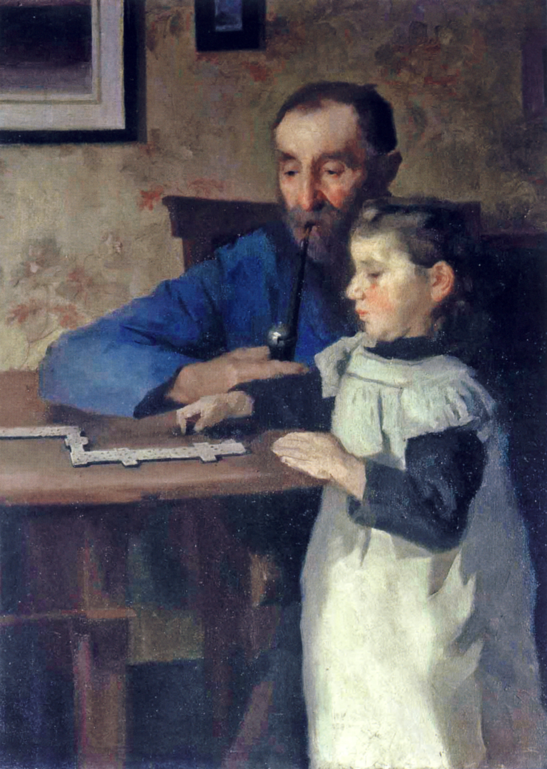 Großvater mit Enkelin beim Dominospiel (1907)